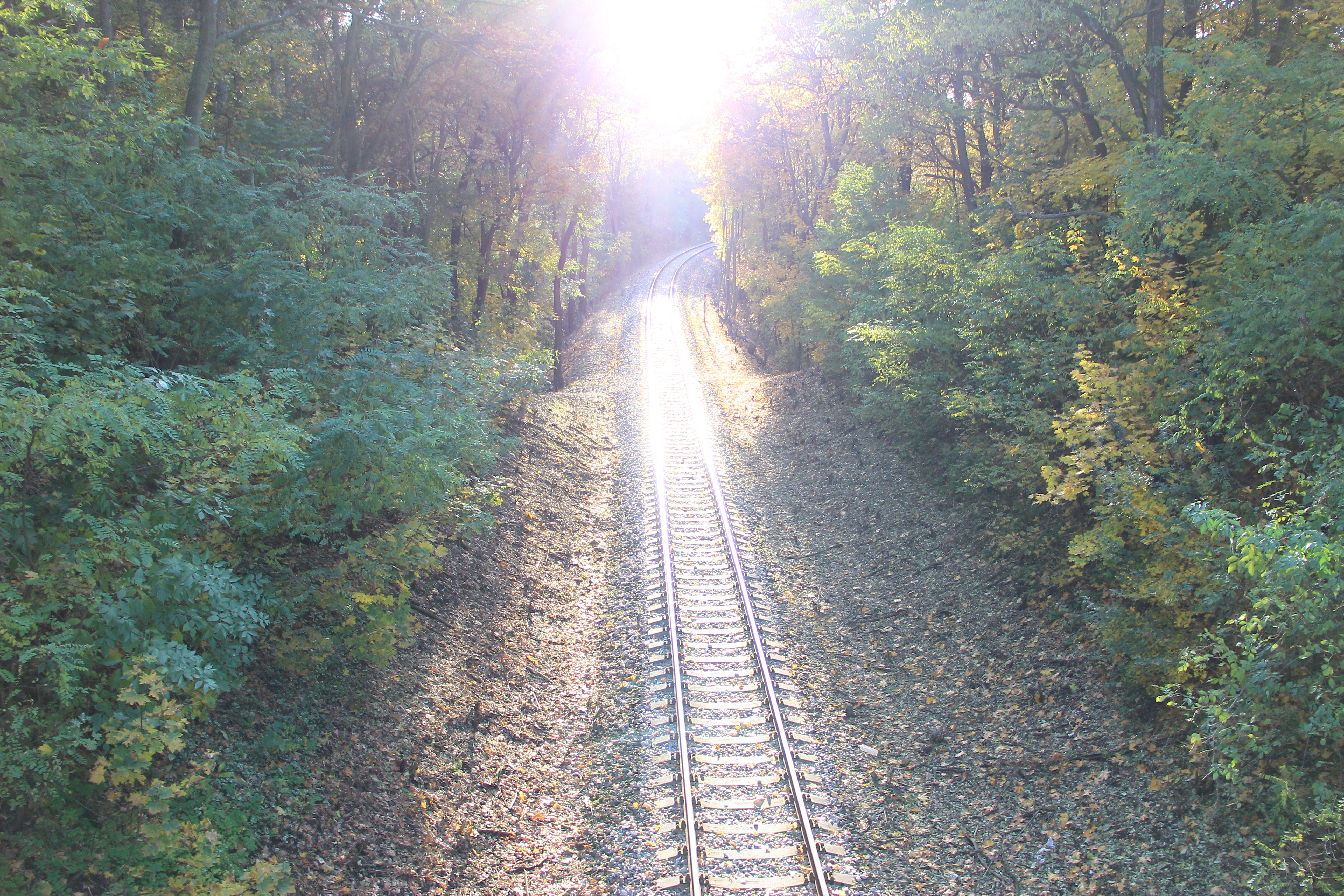 Přírodní park Košíře-Motol, Košíře, Cibulka, z mostu ulice U lesíka – Naskové.